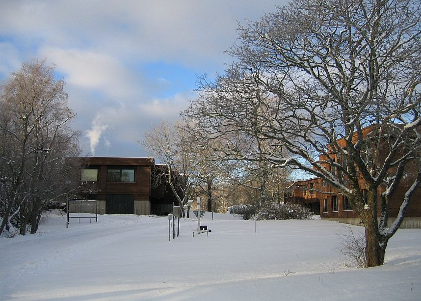 Helsingin yliopiston Tvärminnen biologisen aseman pihaa Hankoniemellä kevättalvella 2004. Pihalla sijaitsee esimerkiksi tutkimusaseman sademittari. Huom: Muista säilyttää viittaus kuvaajaan, mikäli käytät kuvaa.